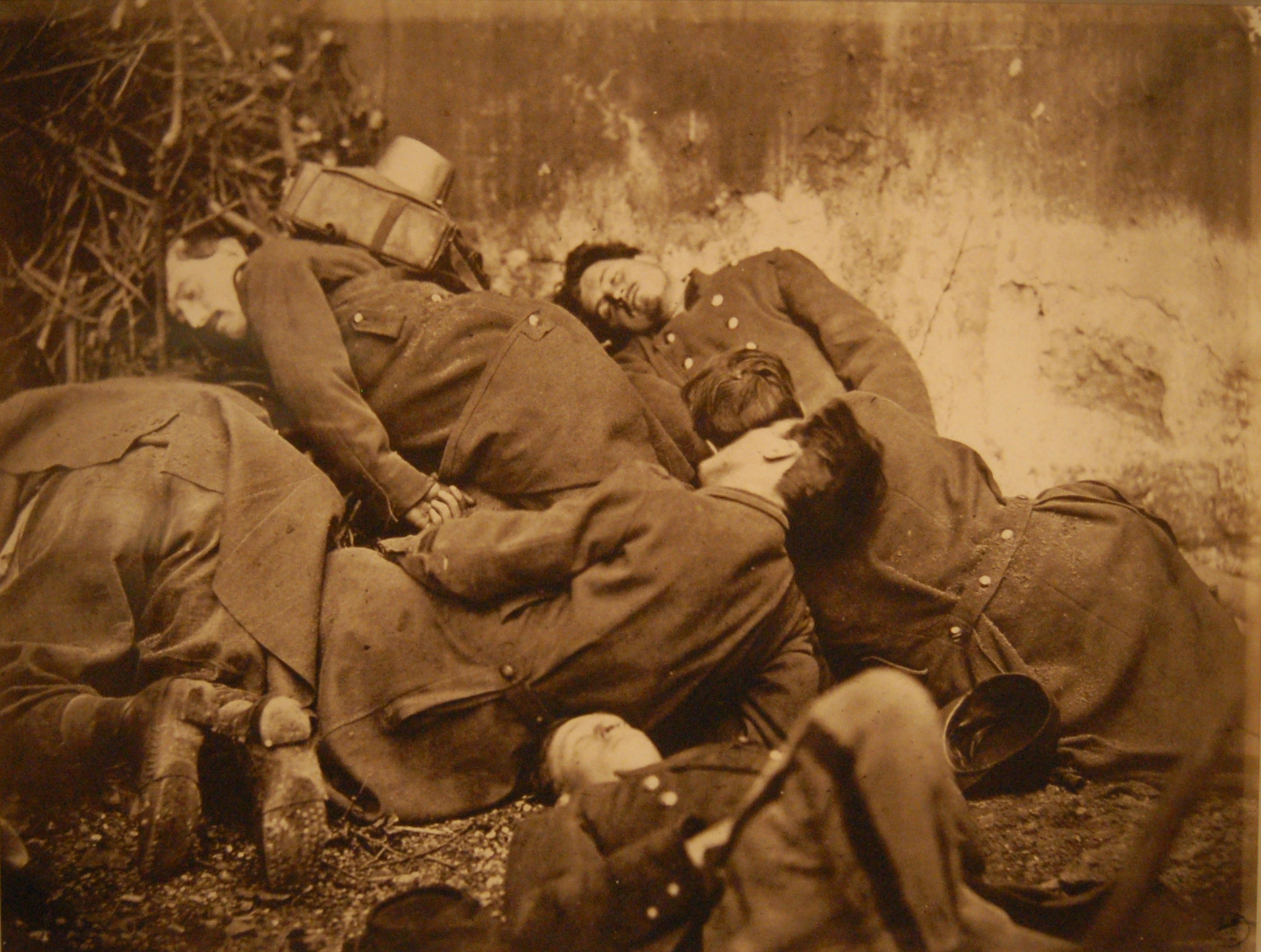 Cadavres de soldats fédérés durant la Commune de Paris de 1871.